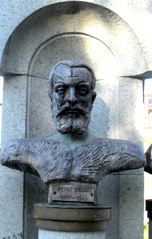 Baia Mare, popiersie Petru Dobra (1817-1848)